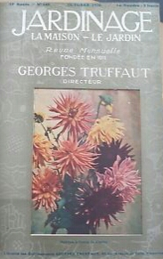 Couverture de la revue Jardinage, reliure 1930-1931, directeur Georges Truffaut.